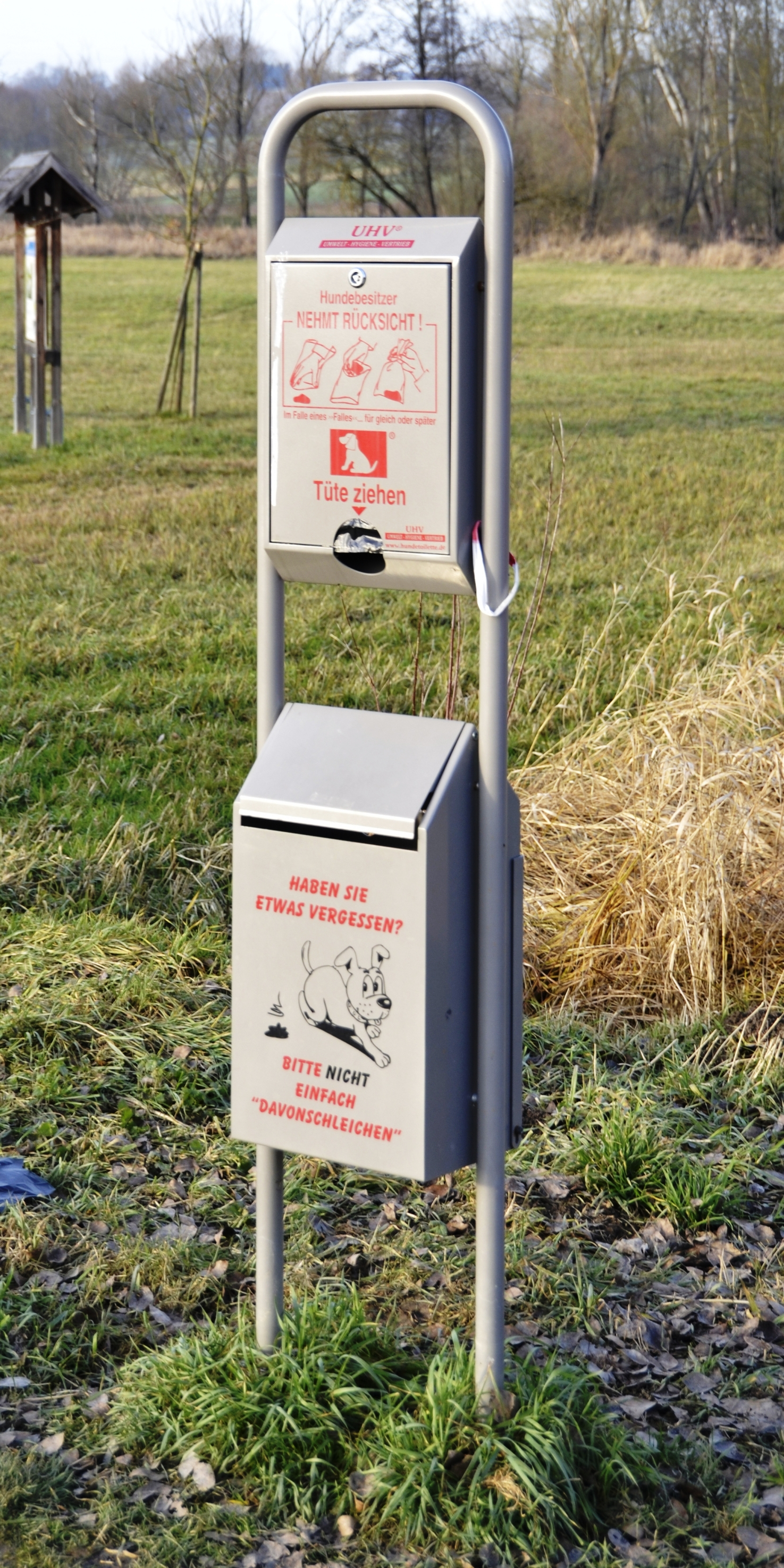 Tütenspender zur Beseitigung des Hundekots im Naturschutzgebiet Vils-Engtal.